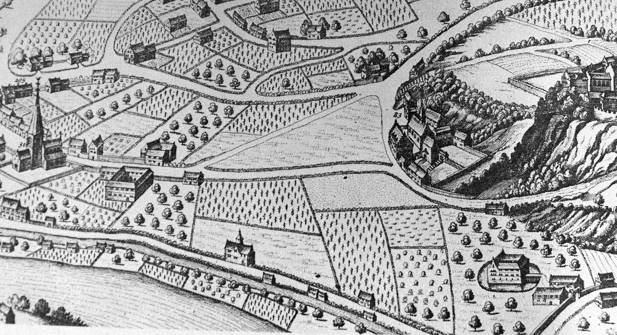 Détail du plan de Liège, Cornillon et Chartreuse, 1849 paru dans "Teatrum Urbium Belgicae Regiae" de Jean Blaeu. Le monastère des Chartreux est à l'extrême droite, au sommet du Mont Cornillon. Il domine le carmel de Cornillon. Map of Liège.